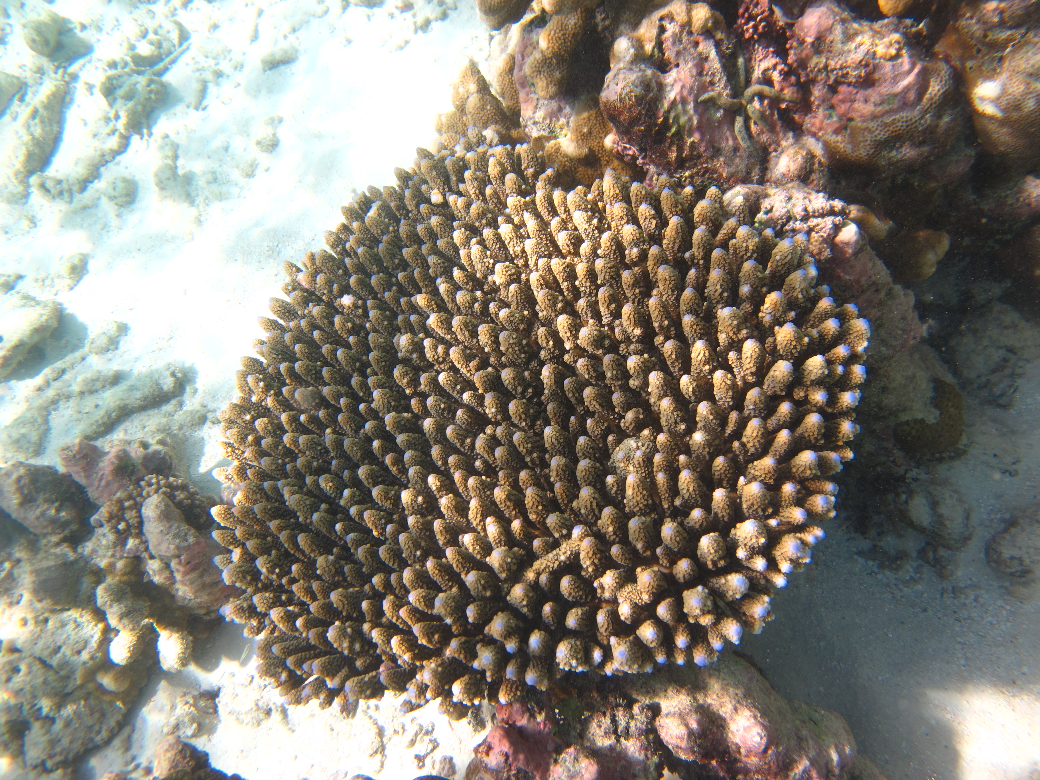 Une colonie de corail Acropora digitifera aux Maldives (atoll de Baa).